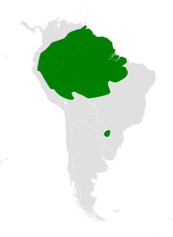 Atticora distribution map